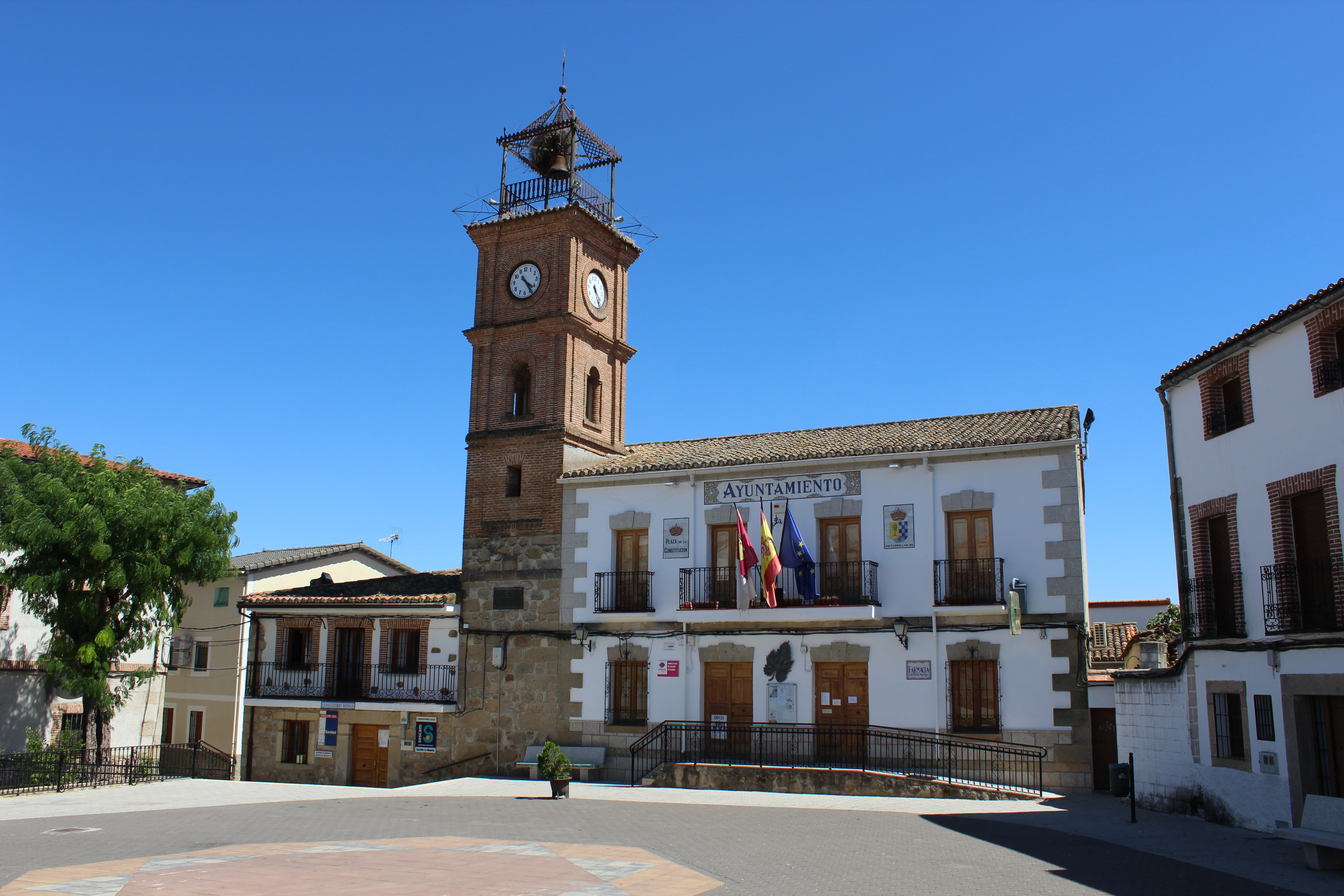 Casa consistorial de Parrillas, Toledo.